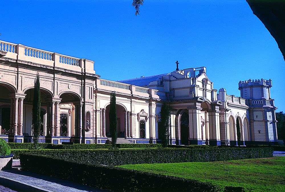 Hacienda la llave en San Juan del Río